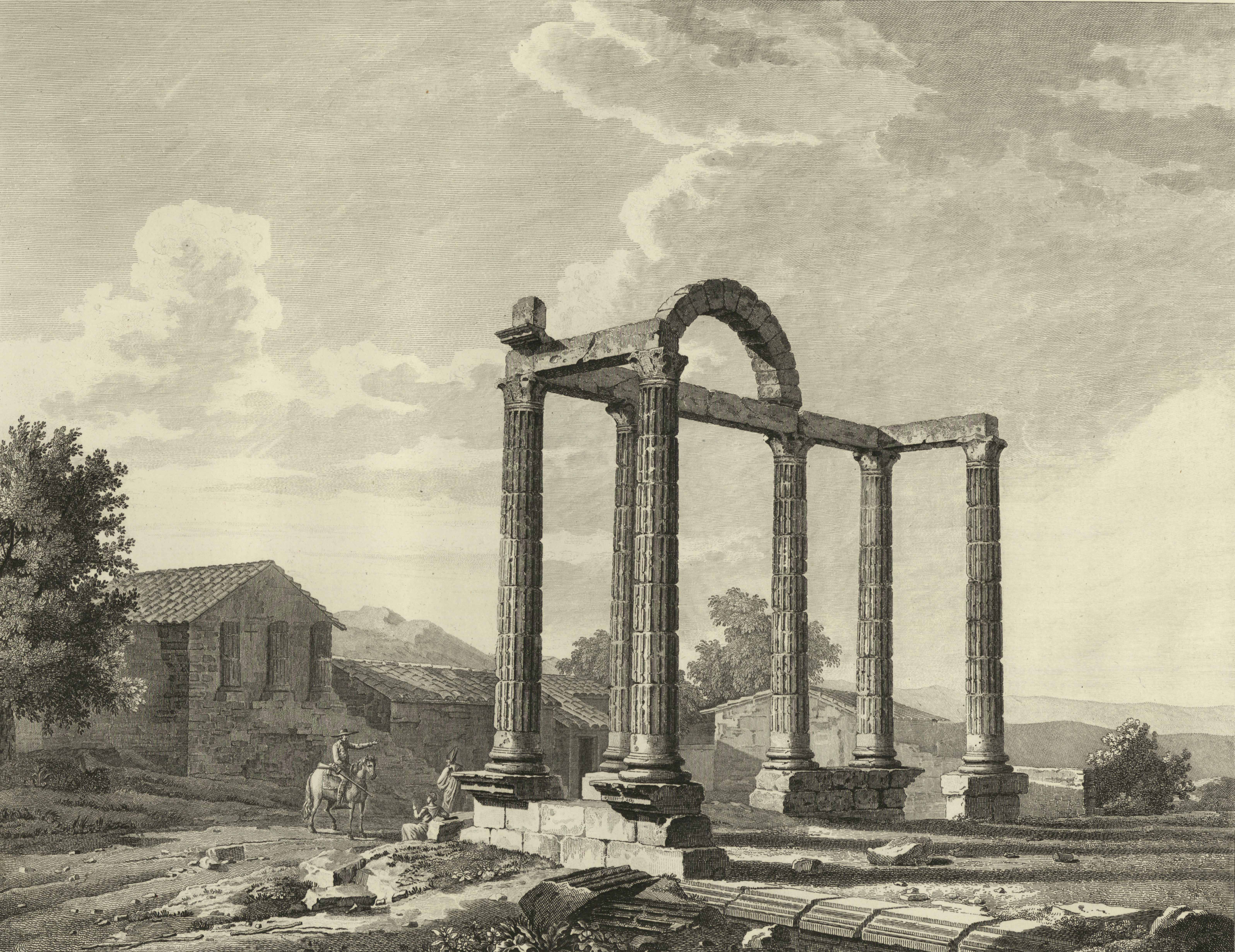 Vestigios de un templo antiguo en Talavera la Vieja.